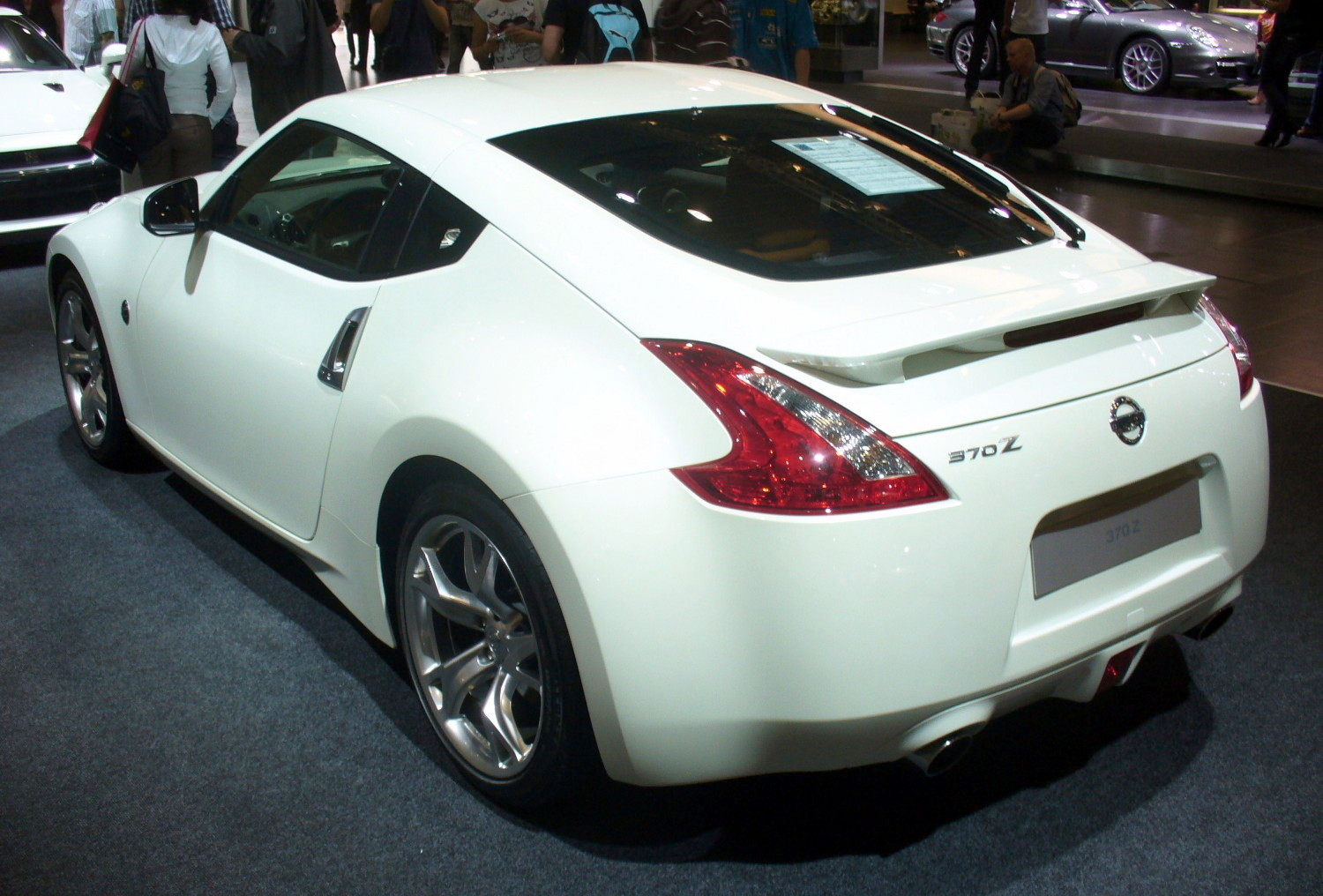 Nissan 370Z